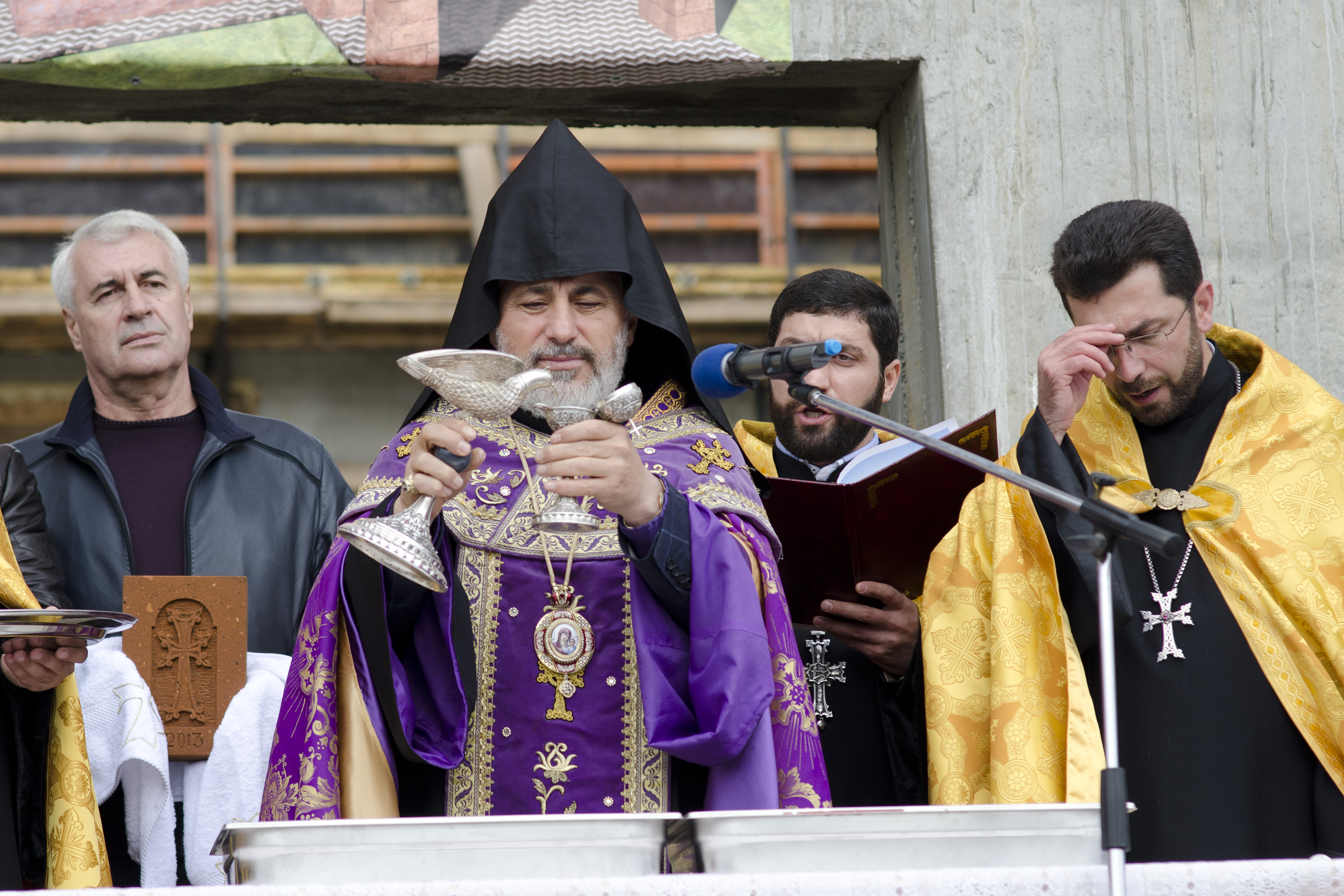 Церемония освящения закладных камней